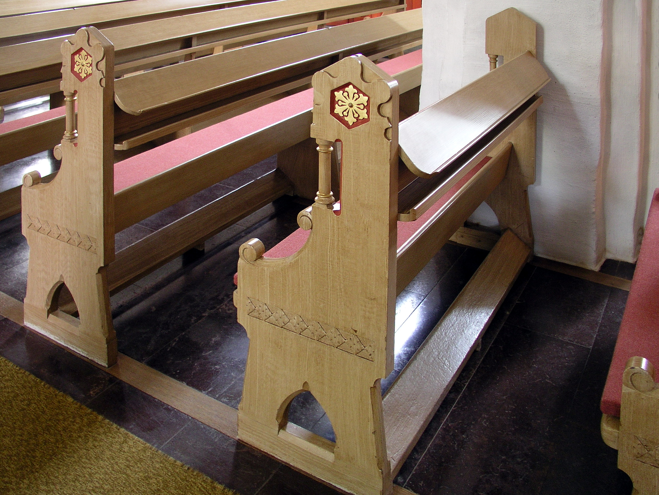 Drothems kyrka, Söderköping. Kyrkbänk. The picture was taken the 30 of June 2003m by Håkan Svensson (Xauxa). (replaces old version Bild:DrothemKyrkbank.jpg)